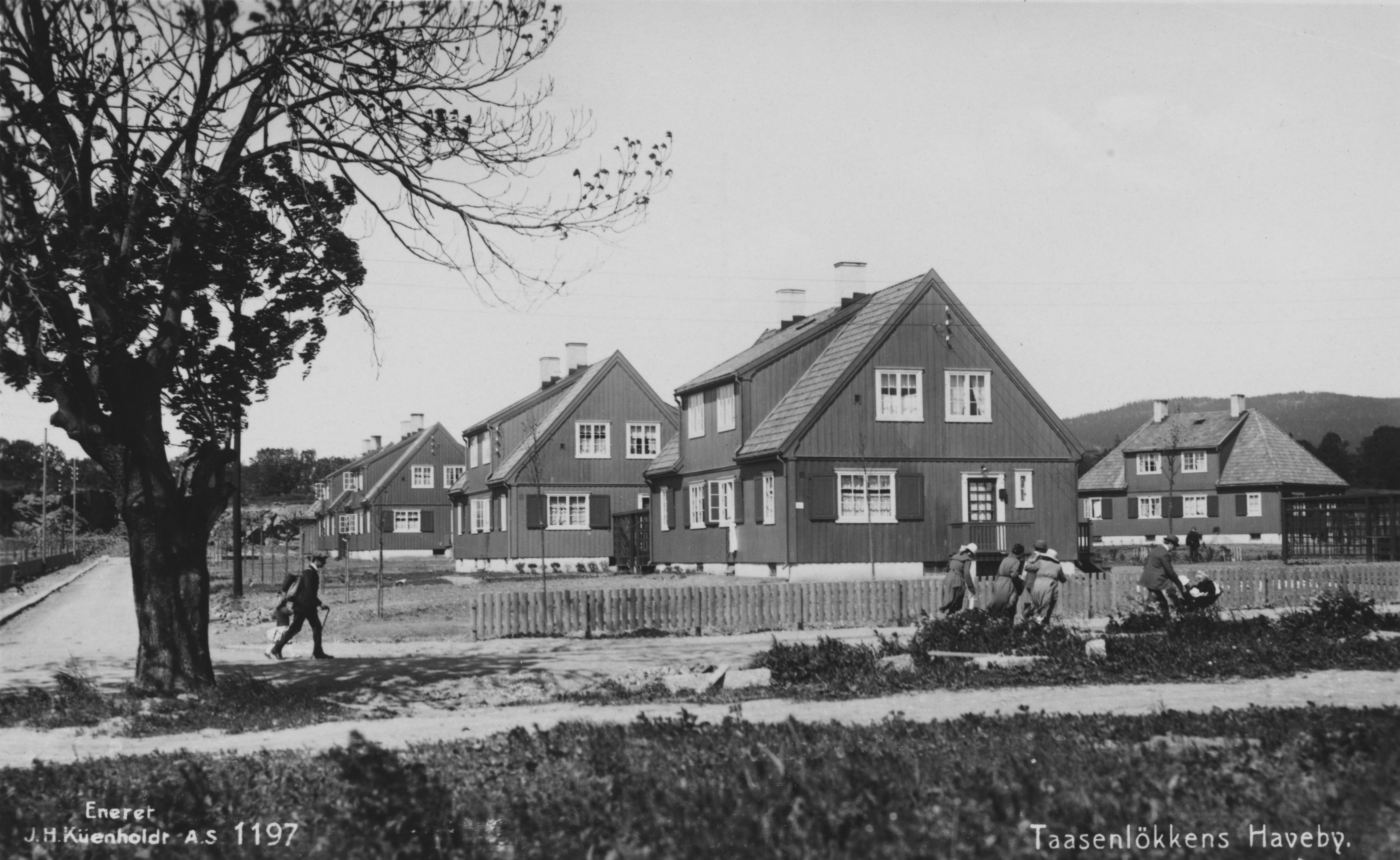 Bildet er hentet fra Nasjonalbibliotekets bildesamling Tåsen, Oslo, Oslo